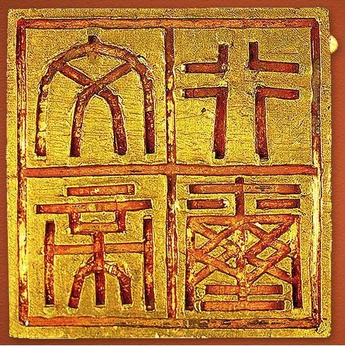 “文帝行玺”金印:汉代龙钮帝玺(南越文王)